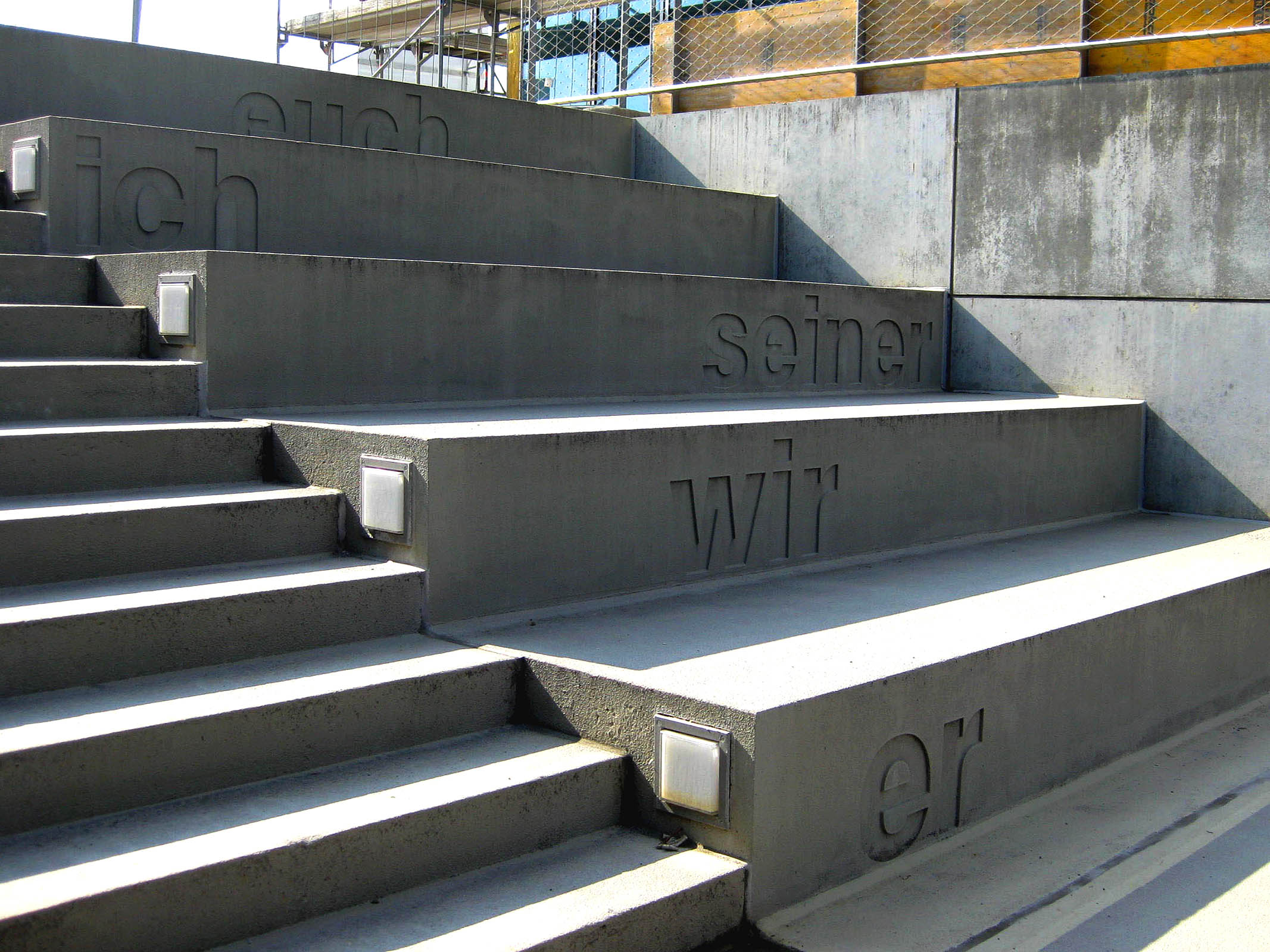 Leo Zogmayer: uns ihnen ihm wir euch mich unser (2004), Treppe (Ausschnitt) und Einzelstücke, Tübingen, Otfried-Müller-Straße 2